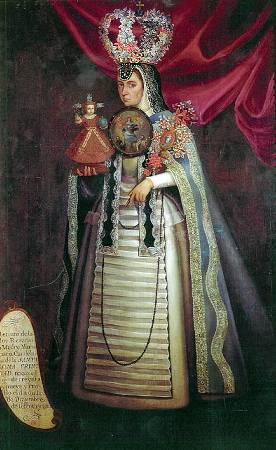 Monja coronada concepcionista